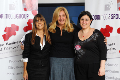 Patricia maldonado (Medio) junto a Celina Amadeo y Michal Nashiv